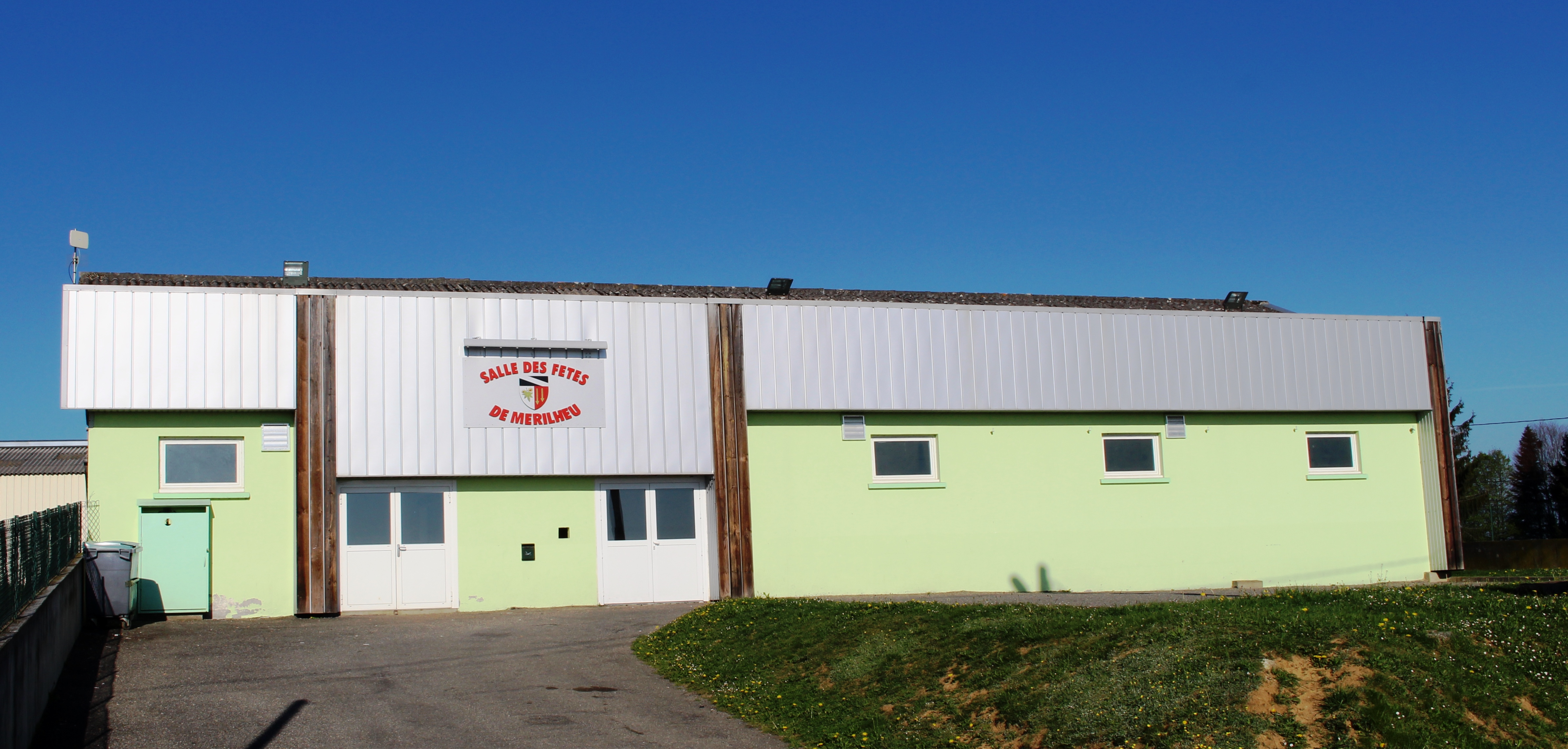 Salle des fêtes de Mérilheu (Hautes-Pyrénées)